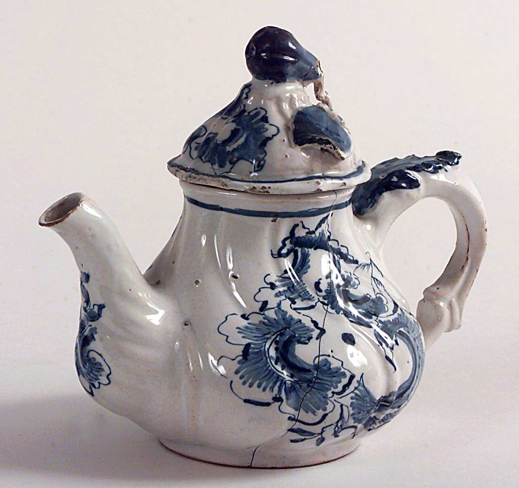 Tekanne fra Herrebøe Fajansefabrik, ant. 1760-årene. Høyde 12,5. cm. Foto Anne-Lise Reinsfelt, Norsk Folkemuseum, NF.1937-0613AB.